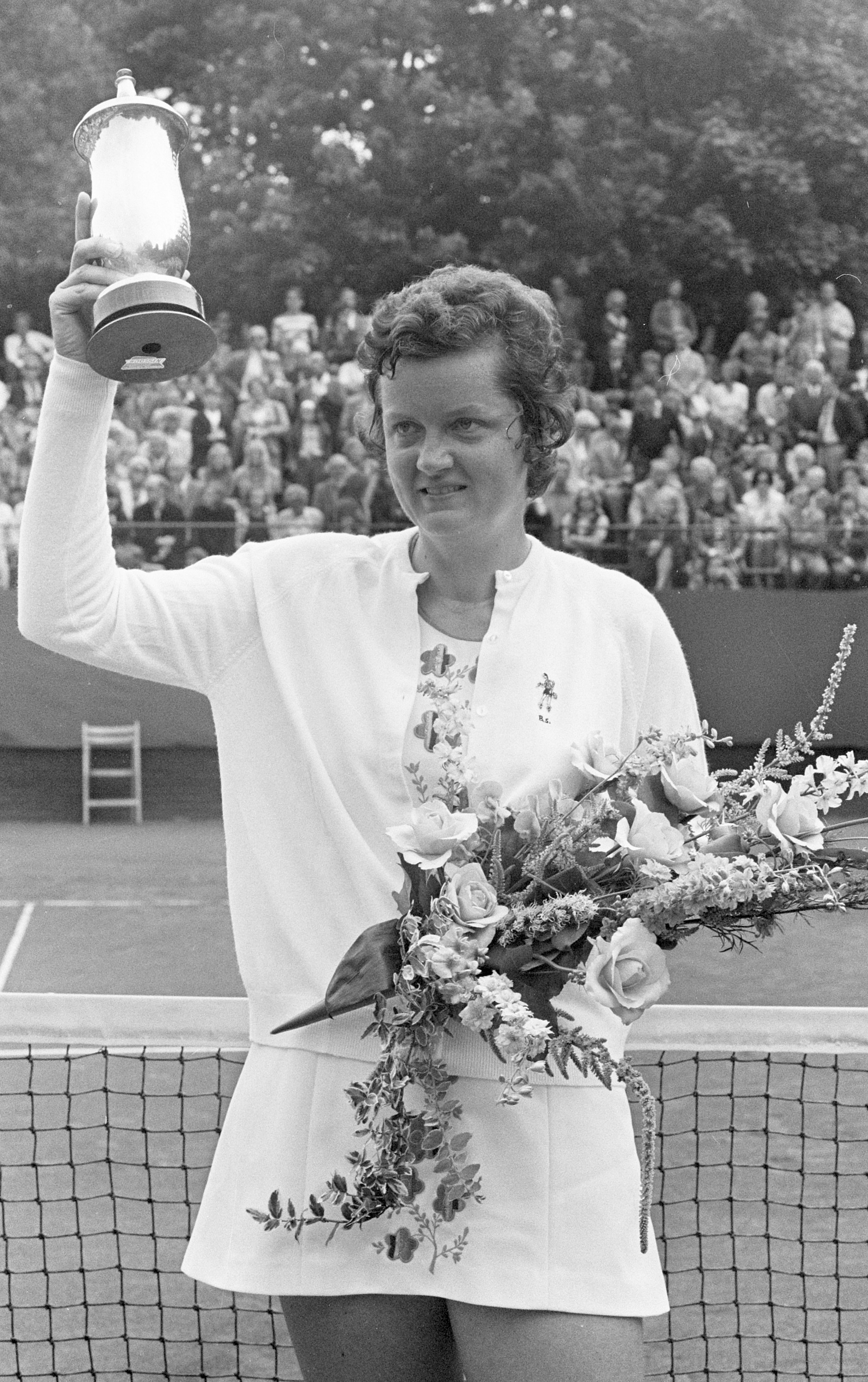 Internationale tenniskampioenschappen Melkhuisje te Hilversum, Betty Stove met beker